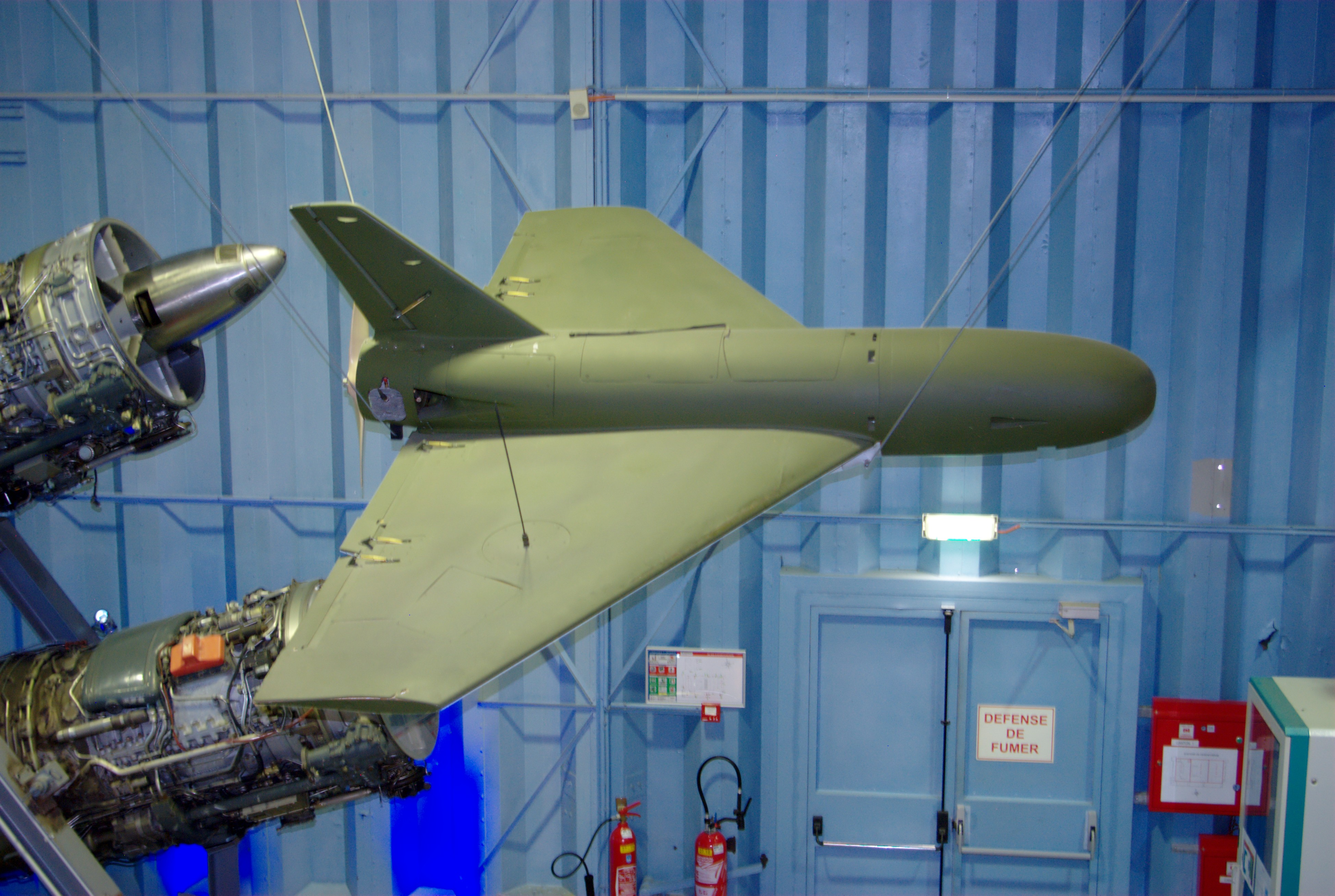 Drone Sagem Crécerelle exposé au musée Safran.